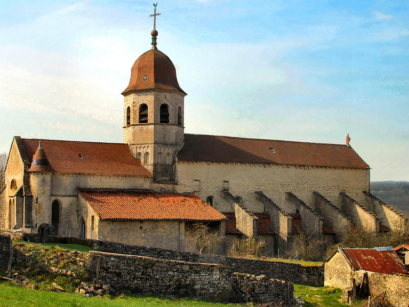 Eglise Abbatiale de Gigny